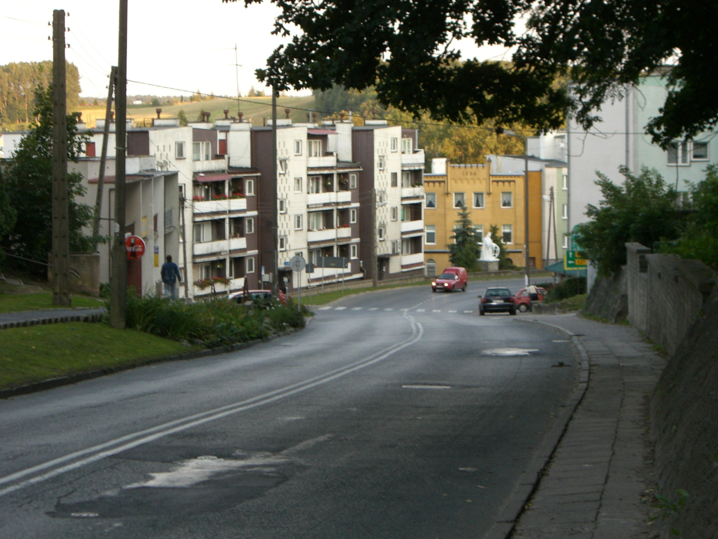 ul. Elbląska w Dzierzgoniu